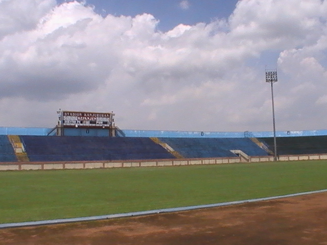 Stadion Kanjuruhan, soccer field